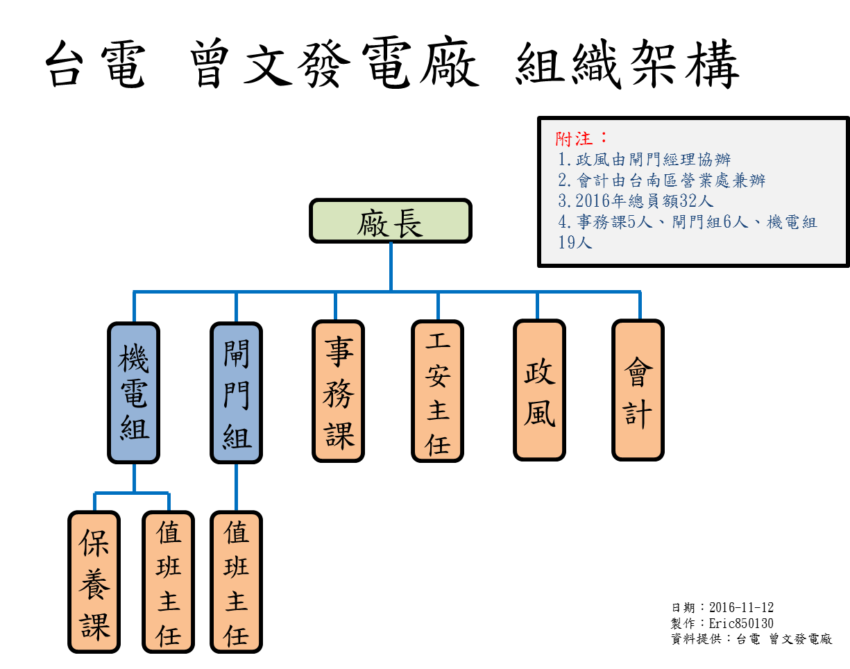 中文（台灣）: 台電 曾文發電廠 組織架構